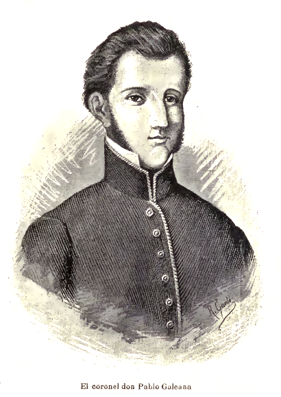 Imagen de Pablo Galeana tomado de Vicente Riva Palacio, Julio Zárate (1880) "México a través de los siglos" Tomo III: "La guerra de independencia" (1808 - 1821)